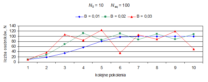 Liczebność populacji obliczone z równania wzrostu logistycznego przy założeniu, że N(0) = 10, N(eq) = 100, a współczynnik B przyjmuje wartości 0,01; 0,02 i 0,03